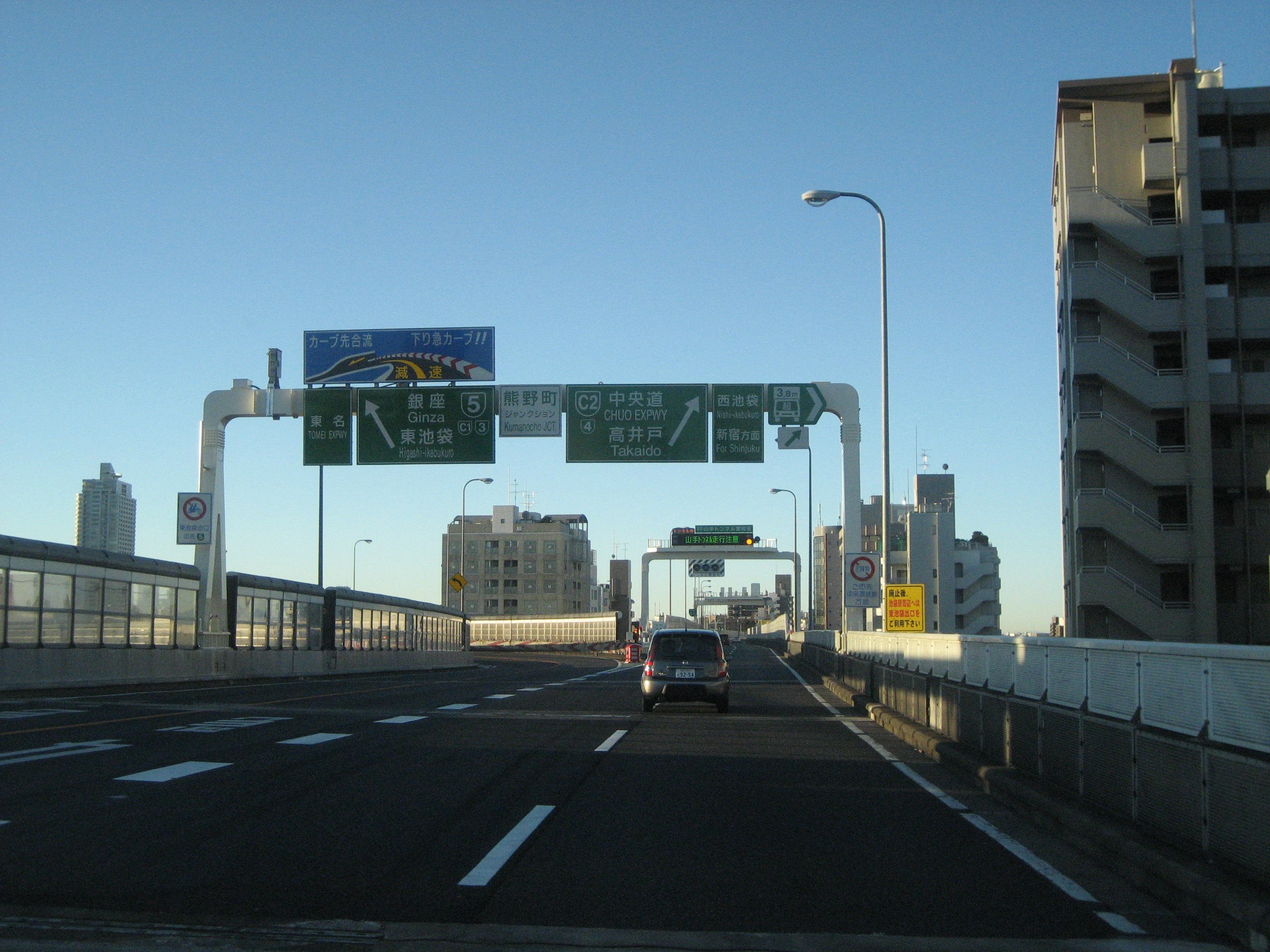 首都高速熊野町ジャンクション（上り）